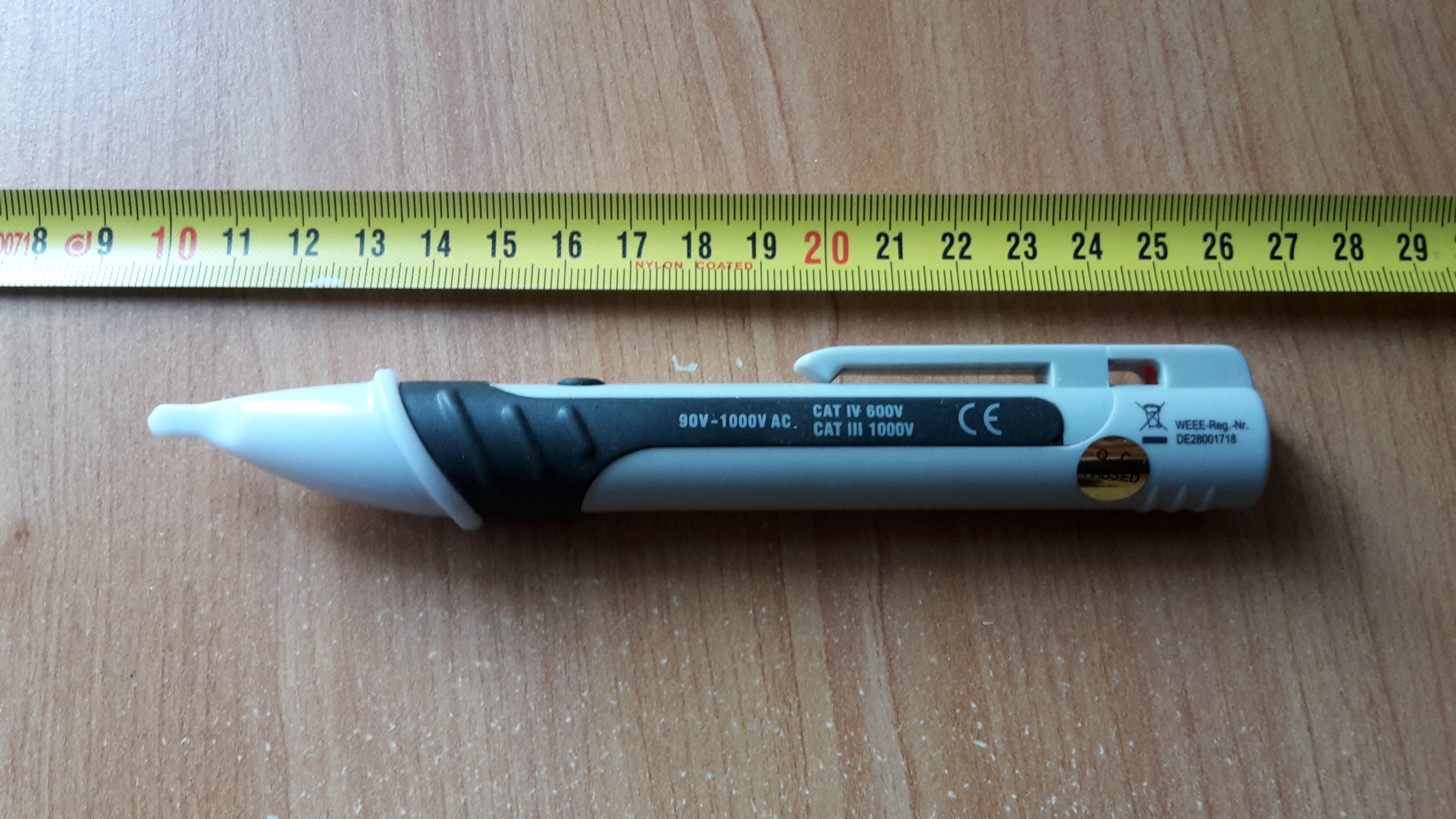 Testeur d'absence de tension - sans électricité à proximité